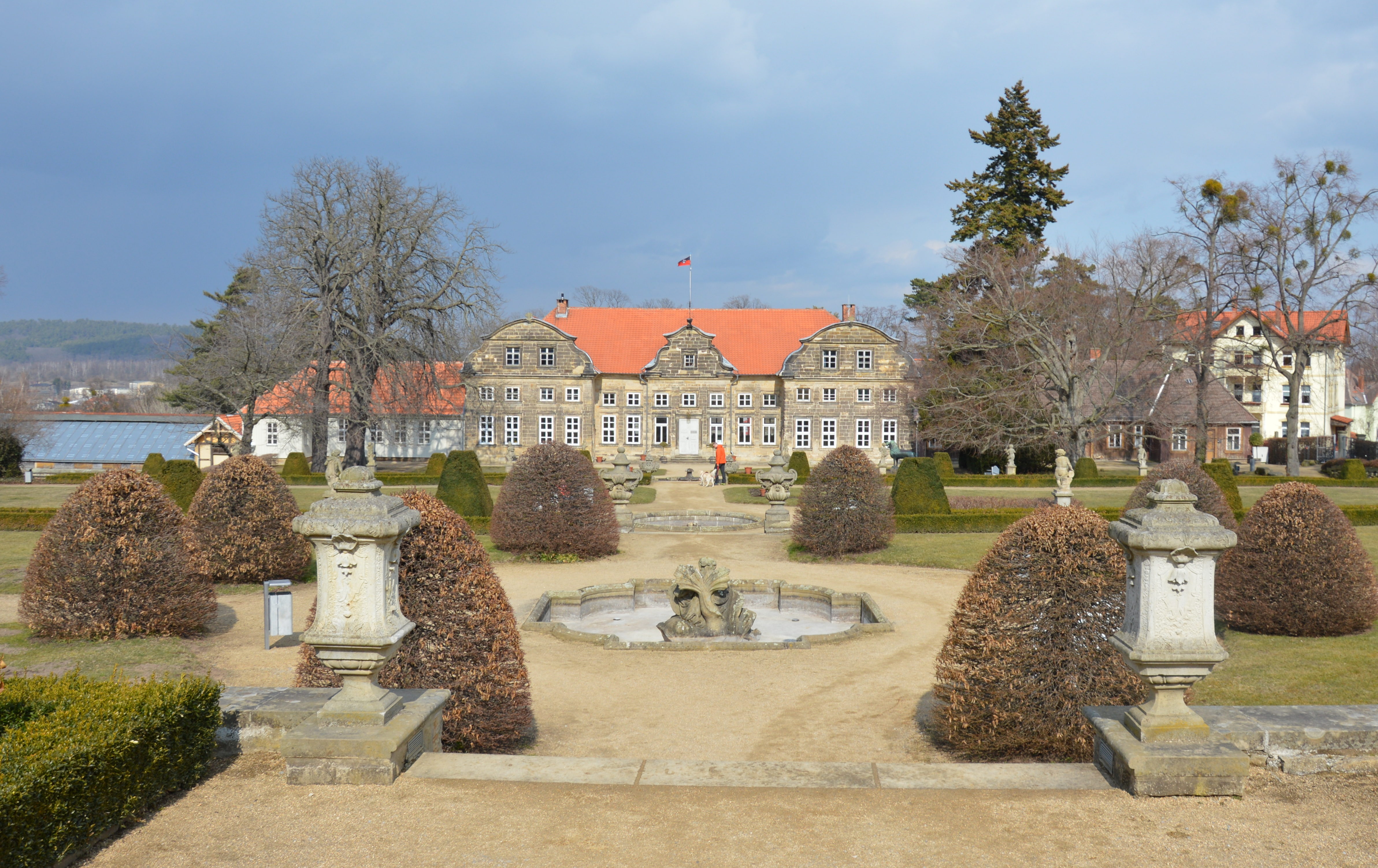 Kleines Schloss Blankenburg